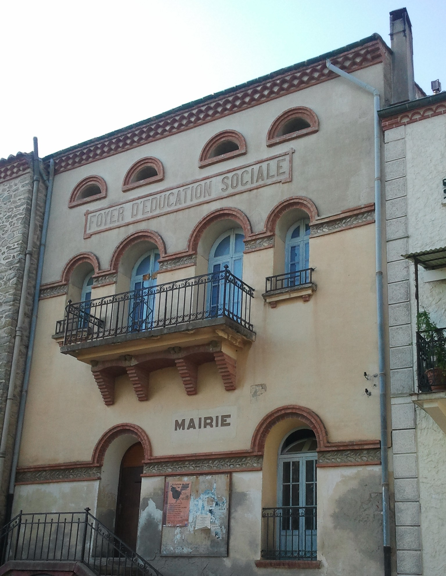 Ancienne mairie de Saint-Jean-Pla-de-Corts